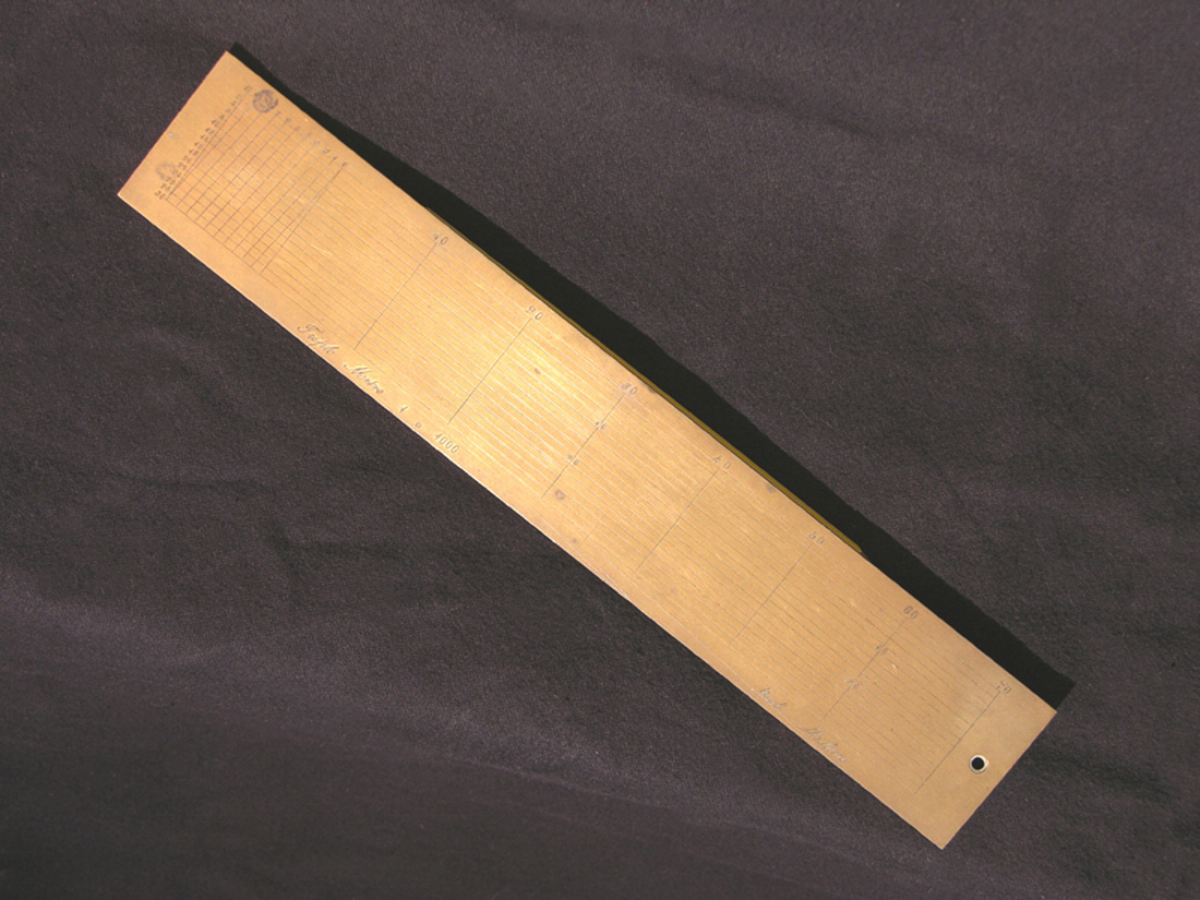 È uno strumento di concezione estremamente semplice ma di grande utilità Si tratta, praticamente, di una sorta di regolo utilizzato per calcolare i rapporti di scala e usato nella cartografia e nella celerimensura soprattutto nel XVIII e XIX secolo. È costituito da una lamina metallica di forma rettangolare. Su una delle due facce è inciso un sistema di righe di riferimento e indici numerici utilizzati dall'operatore per ottenere in modo estremamante veloce i corretti rapporti di lunghezza. Funzione Era uno strumento fondamentale in tutti i casi in cui si dovevano eseguire disegni tecnici; in particolare trovava largo impiego in topografia e cartografia.